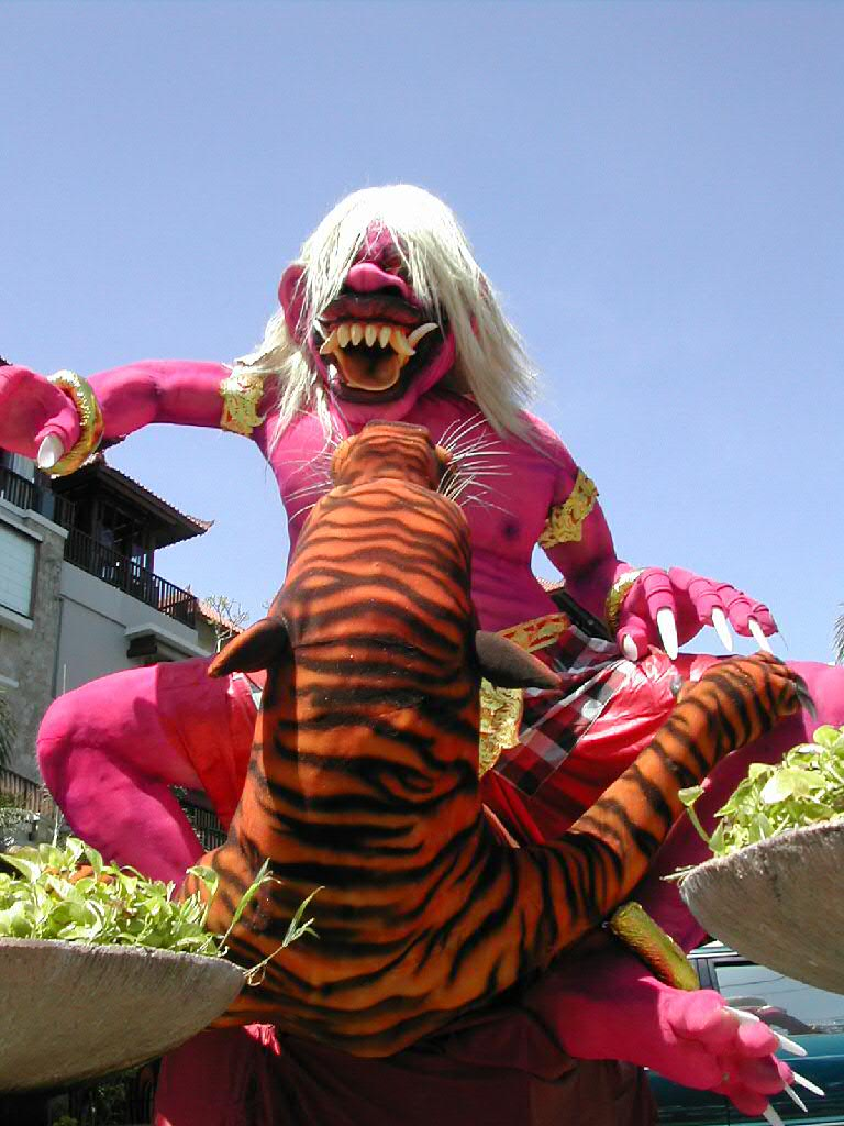 Ogoh-Ogoh à Kuta (Bali, Indonésie)